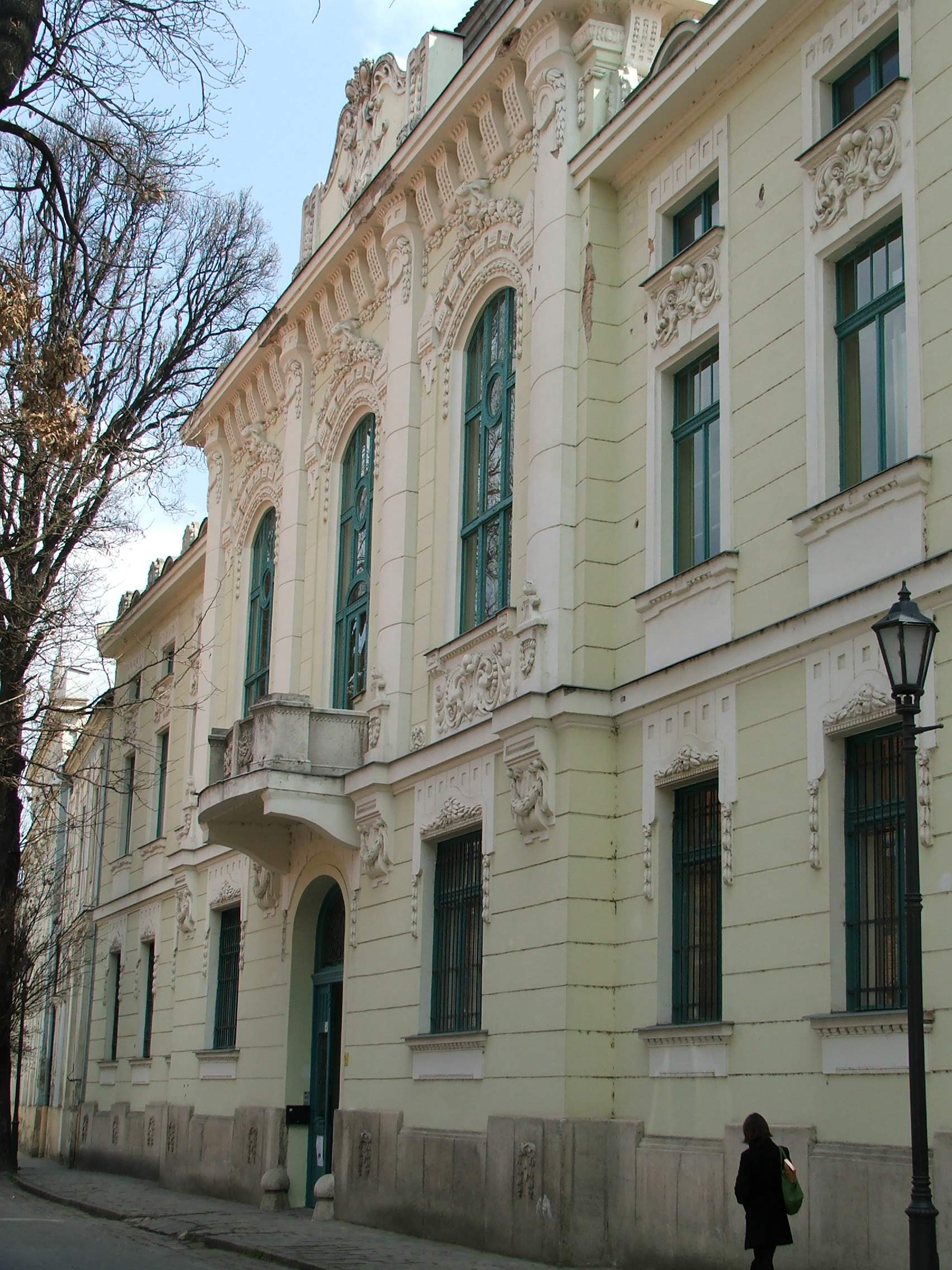 Deák Ferenc street, Esztergom